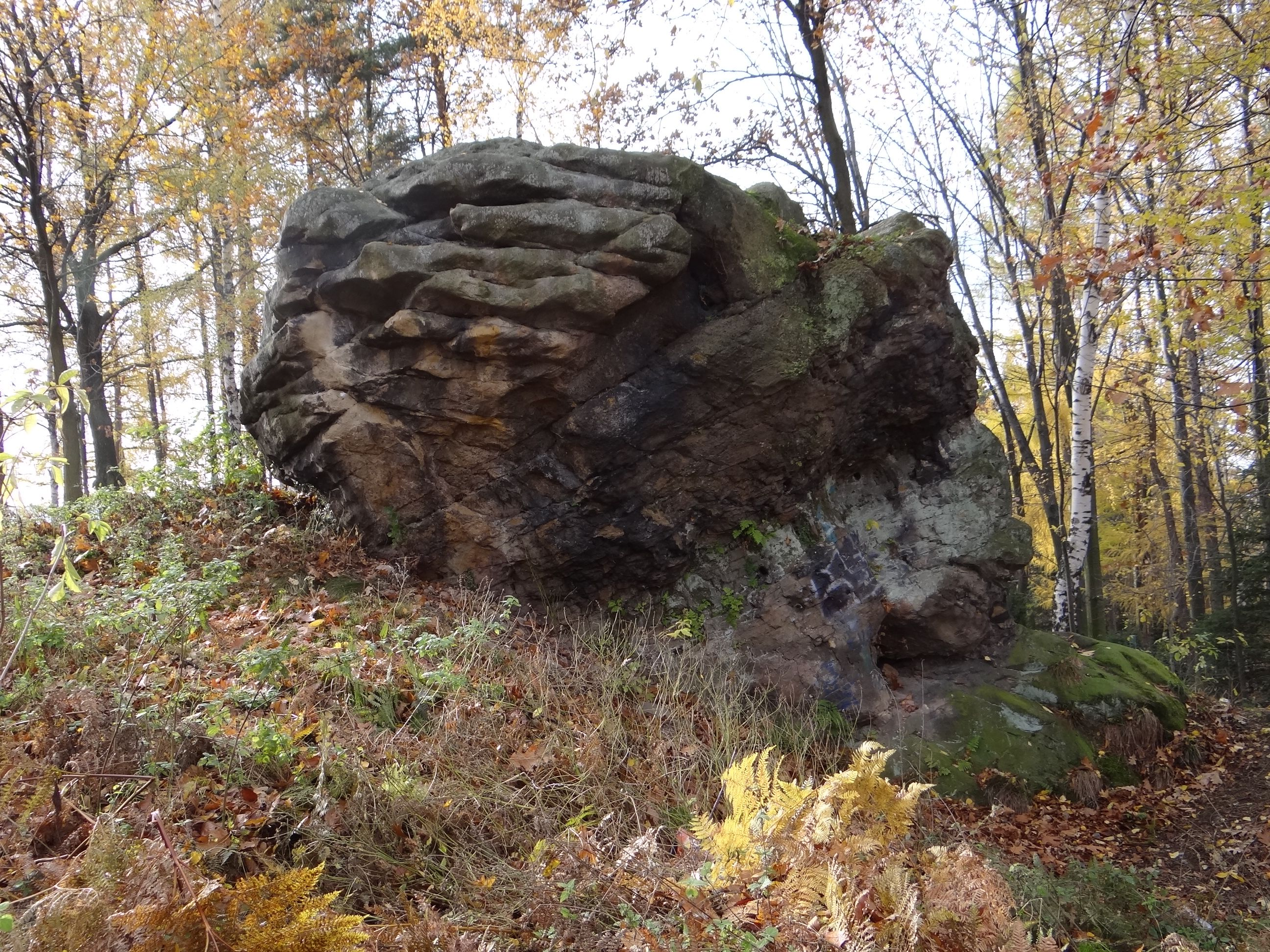 Diabelski Kamień w Kornatce (województwo małopolskie)